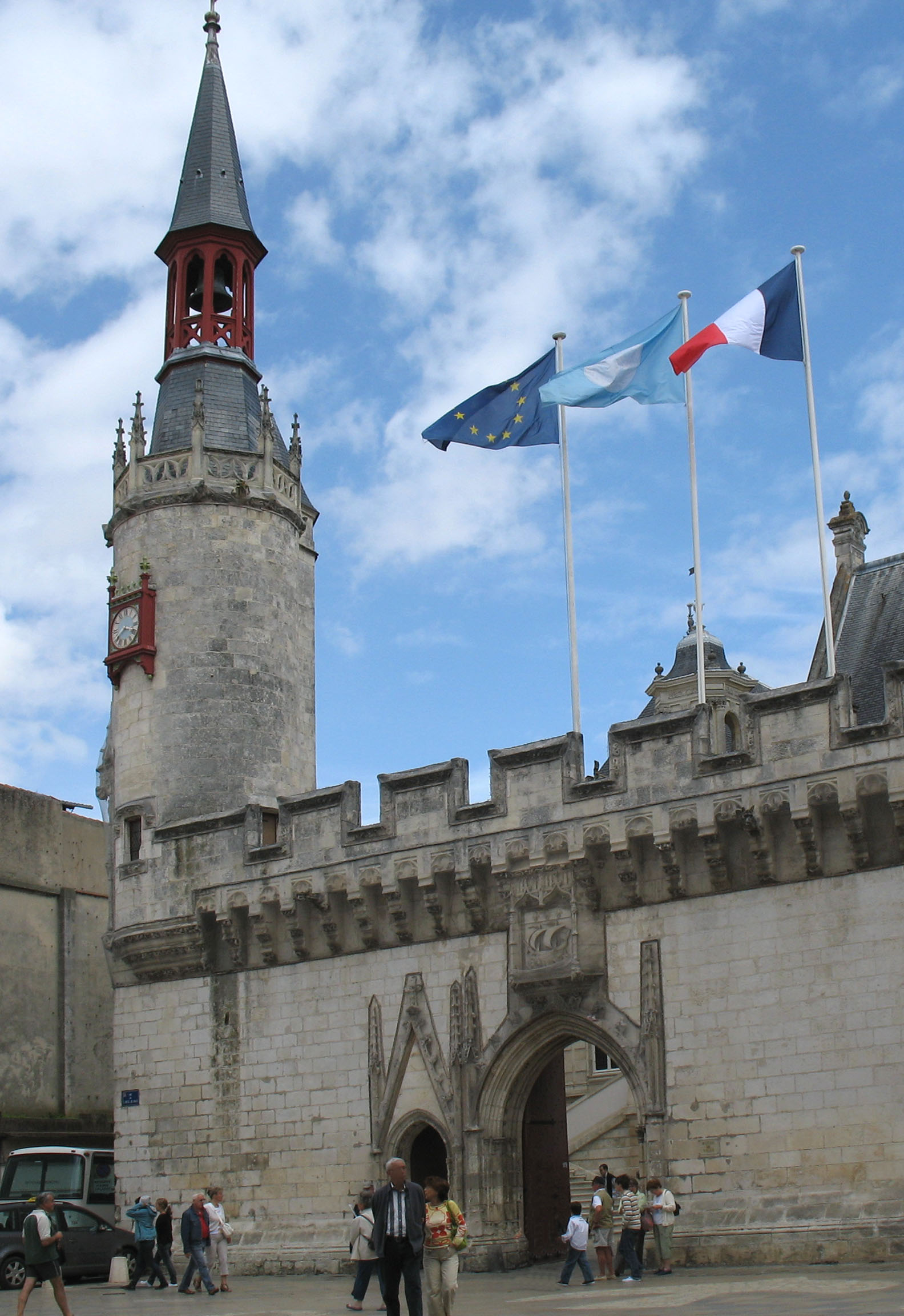 Façade de l'Hôtel de Ville de La Rochelle, France